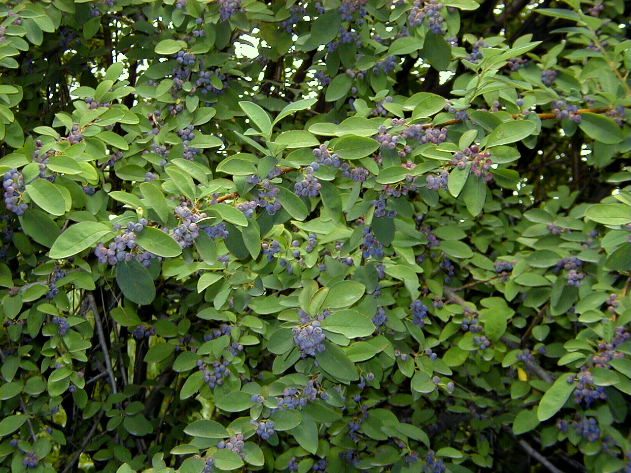 Cotoneaster acutifolius. Real Jardín Botánico, Madrid